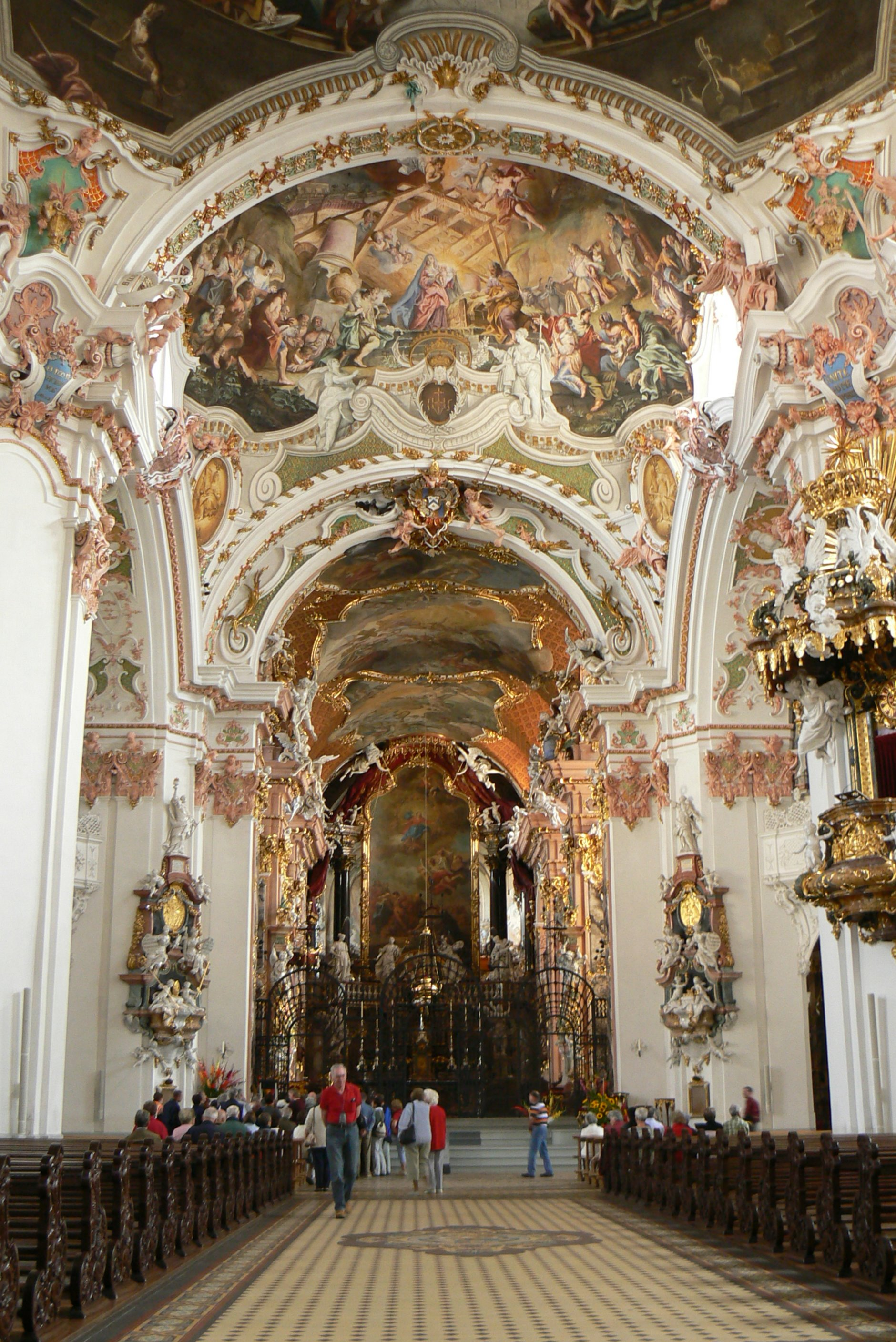 Benediktinerabtei (Kloster) Einsiedeln